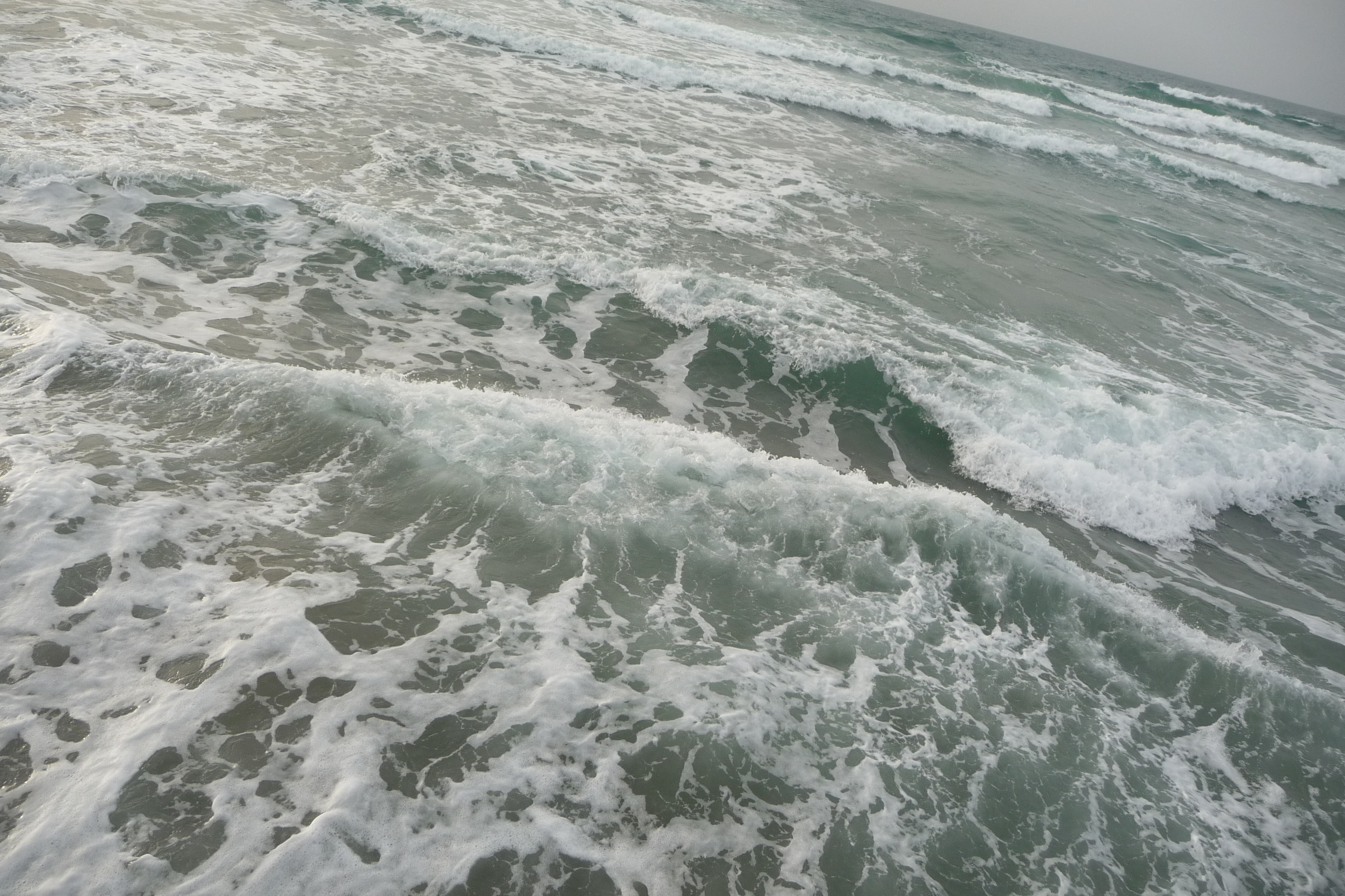 נמל תל אביב, הנמל העברי הראשון ב"עיר העברית הראשונה", ממוקם בצפון מערב העיר תל אביב. הנמל נפתח רשמית ב-23 בפברואר 1938, האוניה האחרונה הגיעה לנמל תל אביב ביום 25 באוקטובר 1965 עבודות הפריקה והטעינה הופסקו ב-3 בנובמבר 1965, בעקבות פתיחתו של נמל אשדוד. אזור המעגן הישן משמש כיום כמרכז בילויים.